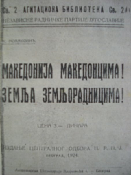 "Македония на македонците. Земята на земеделците". Srpskohrvatski / српскохрватски: "Makedonija Makedoncima. Zemlja zemljoradnicima".